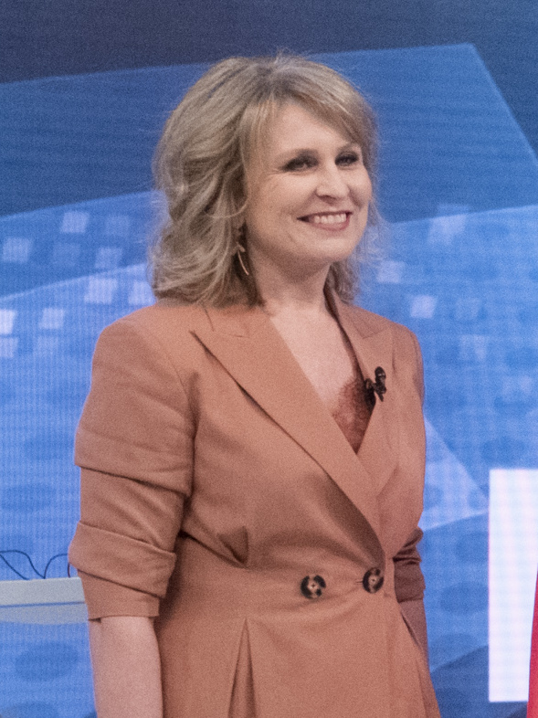 _DPZ0941